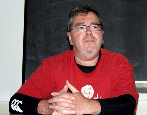 Ian McDonald na SFeraKonu